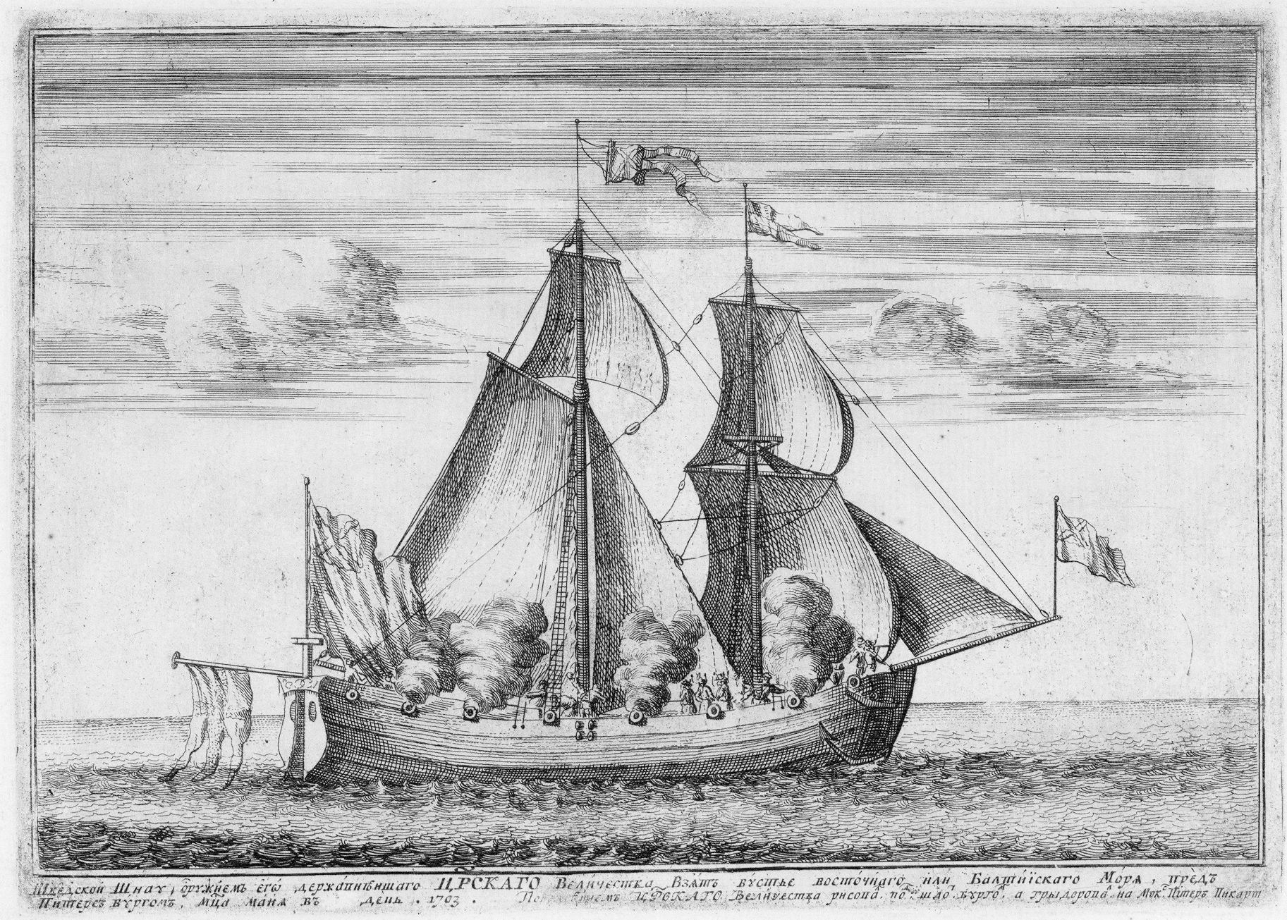 Шведское военное судно Астрильд, захваченное русскими войсками в мае 1703 года в устье Невы. Данное изображение было использовано в статье «Астрильд» опубликованной в третьем томе «Военной энциклопедии», который был издан книгоиздательским товариществом Ивана Дмитриевича Сытина в 1911 году в столице Российской империи городе Санкт-Петербурге.